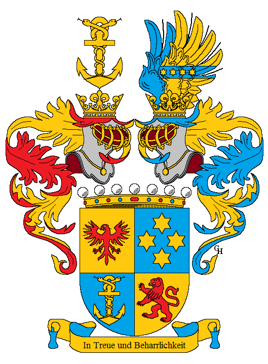 Wappen des österreichischen Großgrundbesitzers Dr. Rudolf Ritter Wiener von Welten (1864–1938), verliehen anlässlich seiner Erhebung in den österreichischen Freiherrenstand 1918. Zeichnung von Gerd Hruška ( Für weitere Informationen zu dieser Standeserhebung siehe (